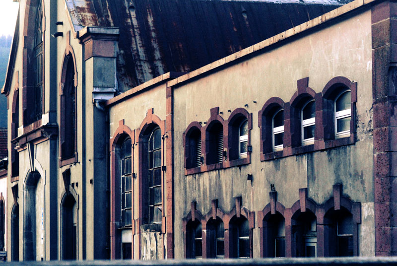 Les Abattoirs à La Chaux-de-Fonds